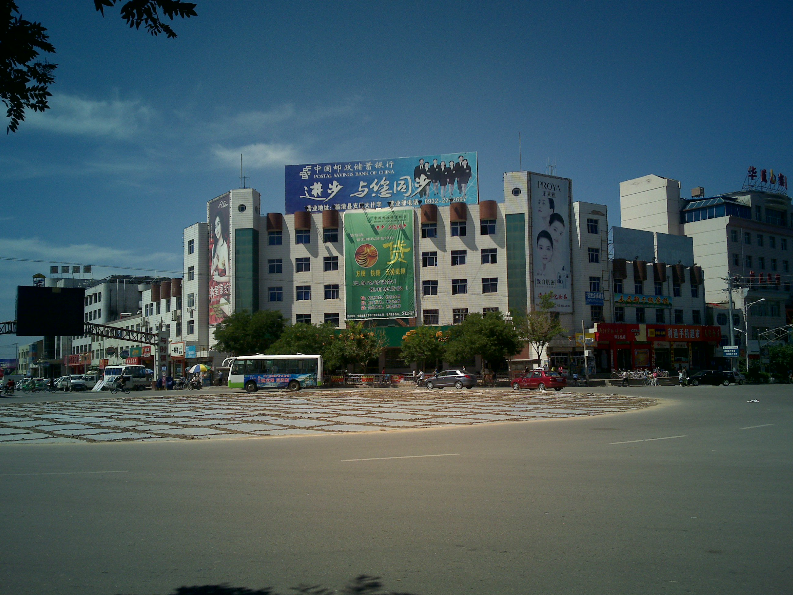 临洮街景-1